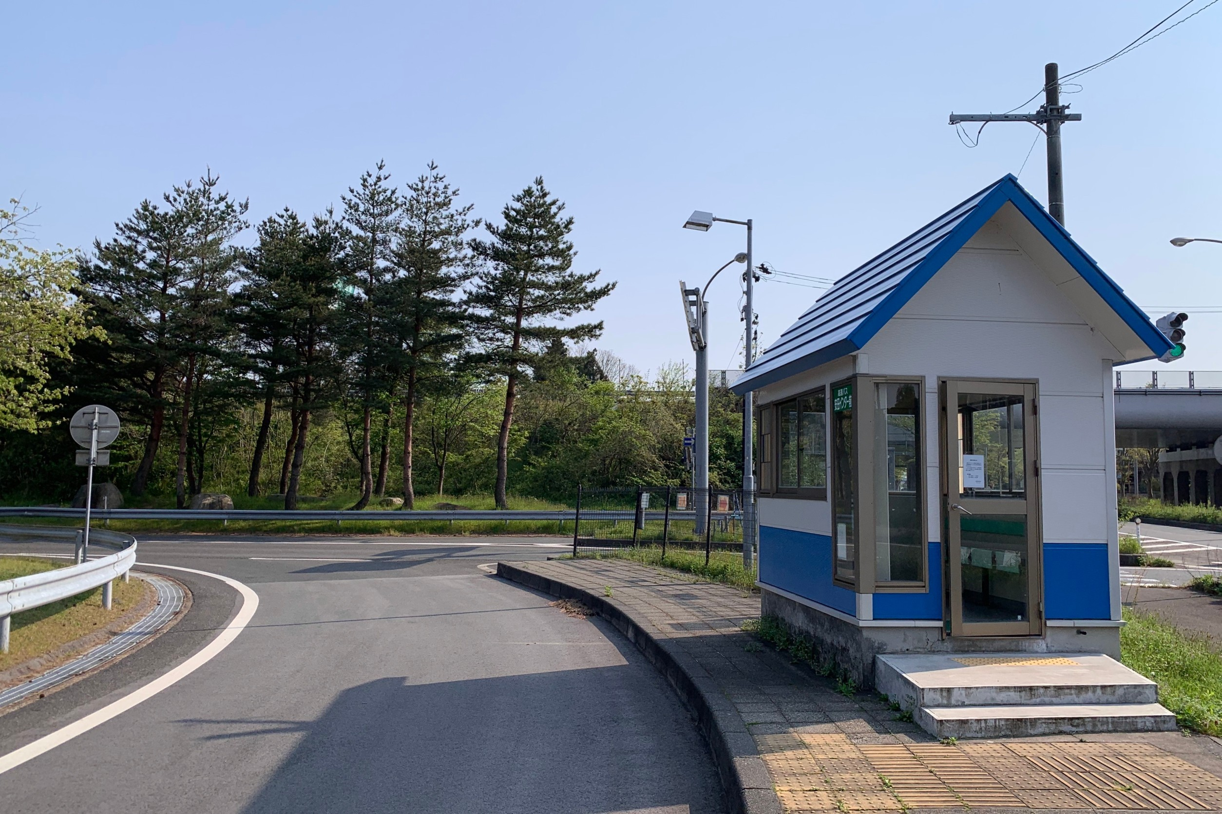 磐越道 安田バスストップ（安田インター前バス停）（2020年5月）